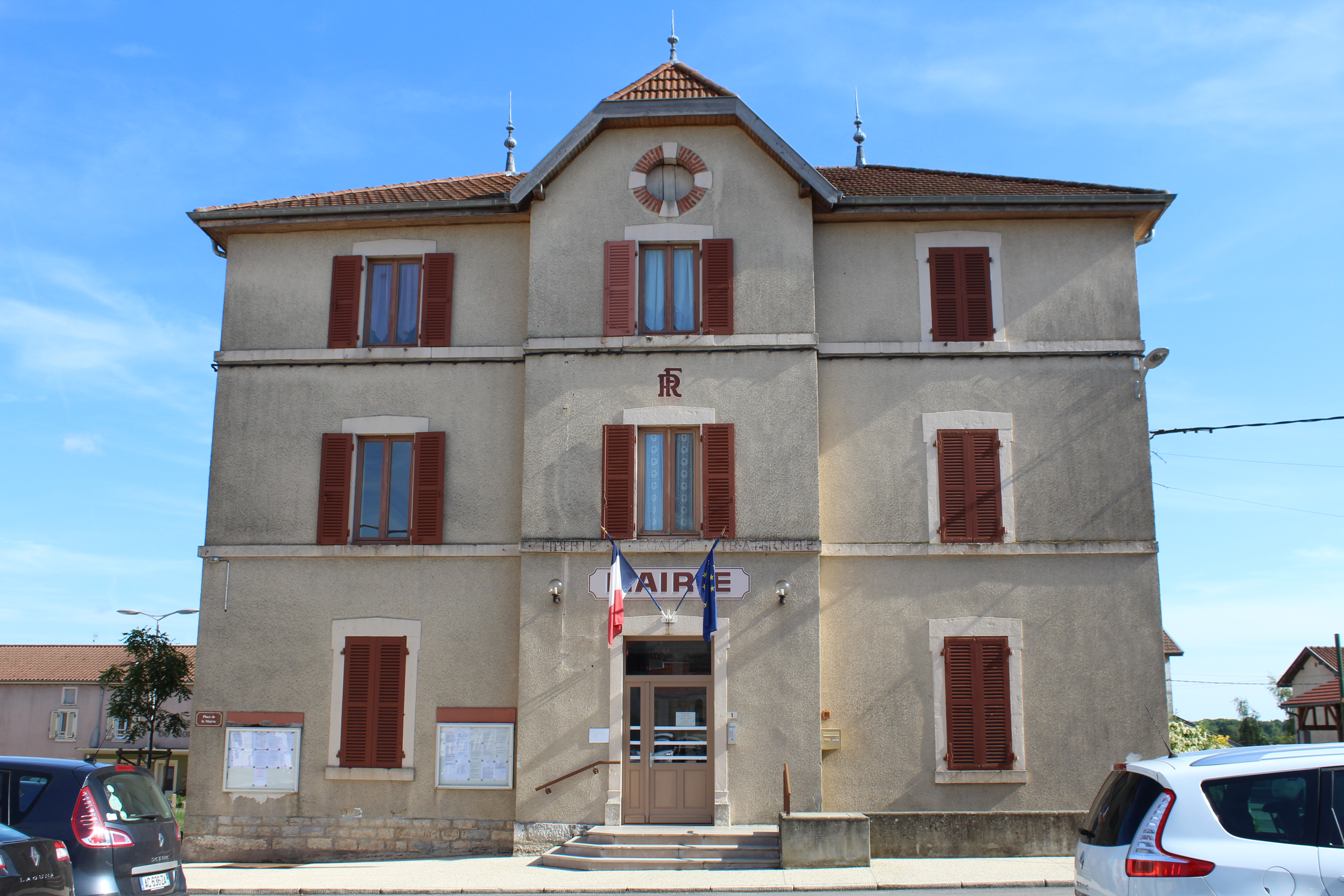 Mairie de Dompierre-sur-Veyle.